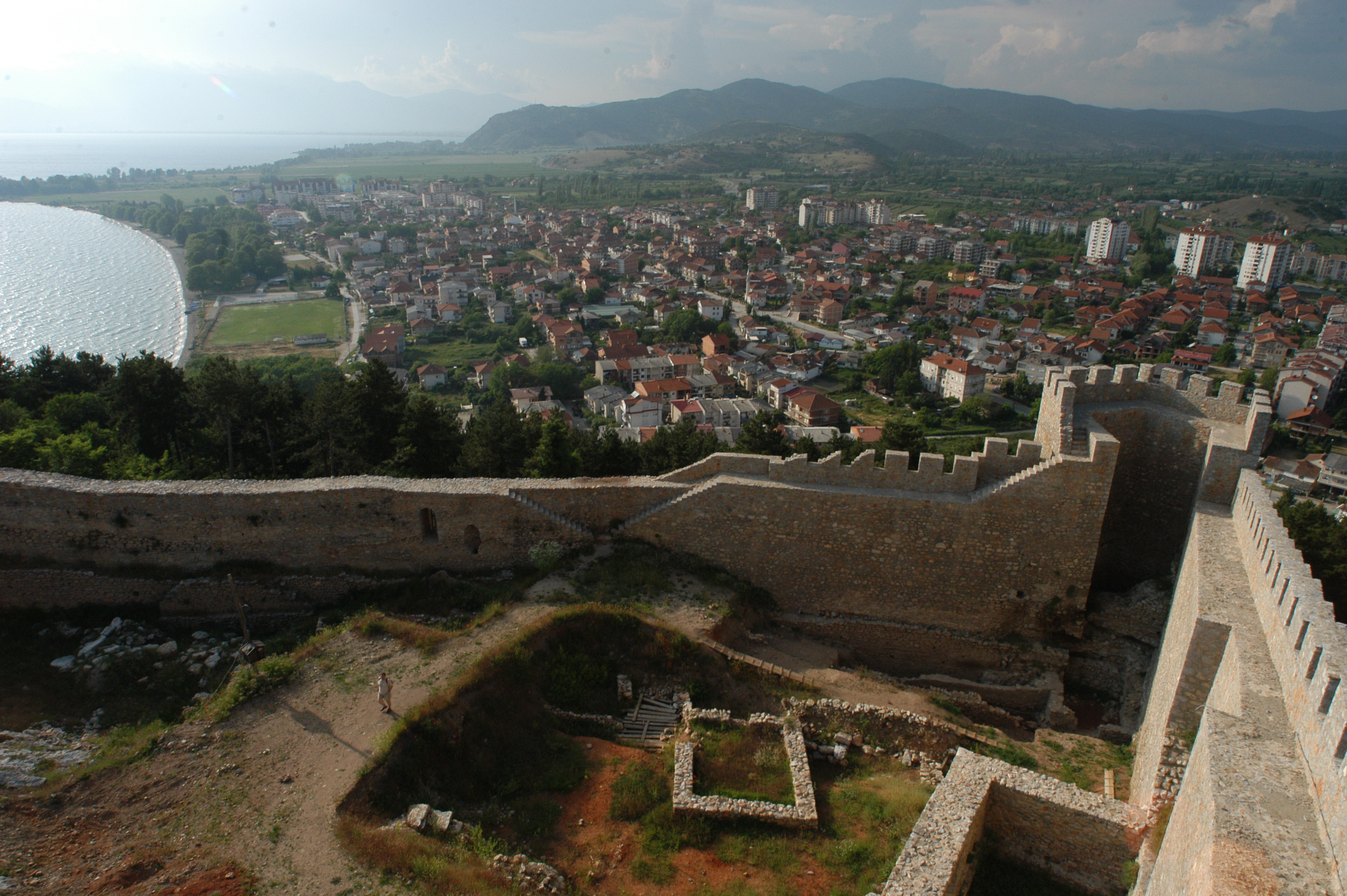 Самоиловата тврдина во Охрид, Македонија